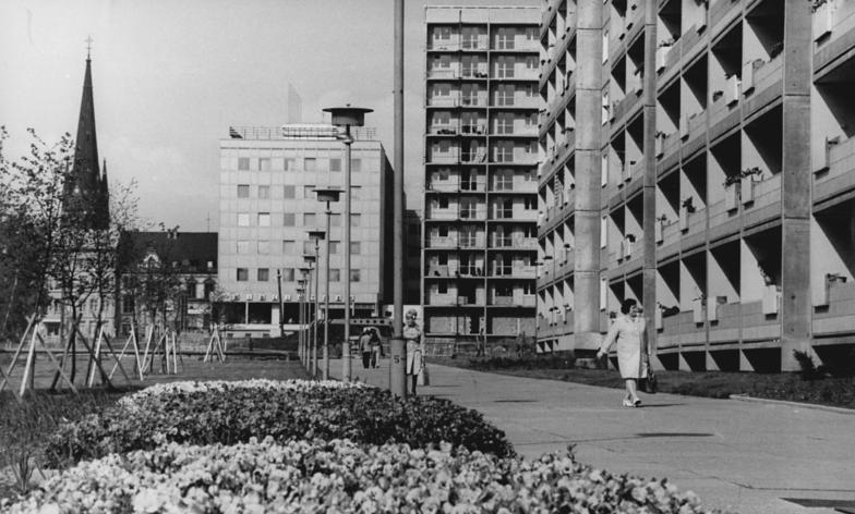 Gera, Wohnblocks ADN-ZB Liebers 1.6.1974 Gera: Blick auf die Julius-Fucik Straße.